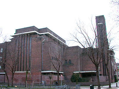 Amsterdam: Raw Aron Schuster Synagoge. Eigen werk.